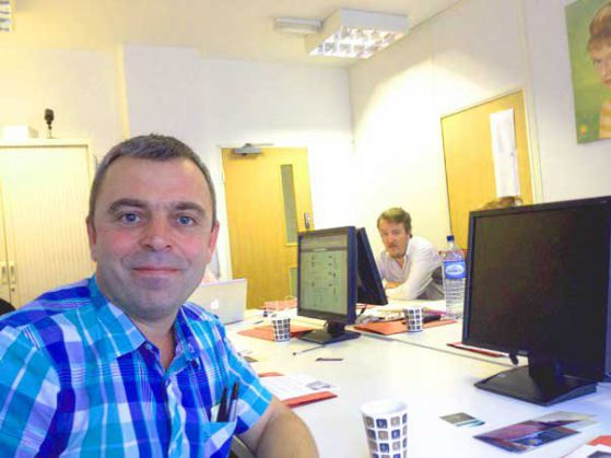 Георги Календеров на двудневен семинар по Social Media Marketing в Лондон, 2013 г.